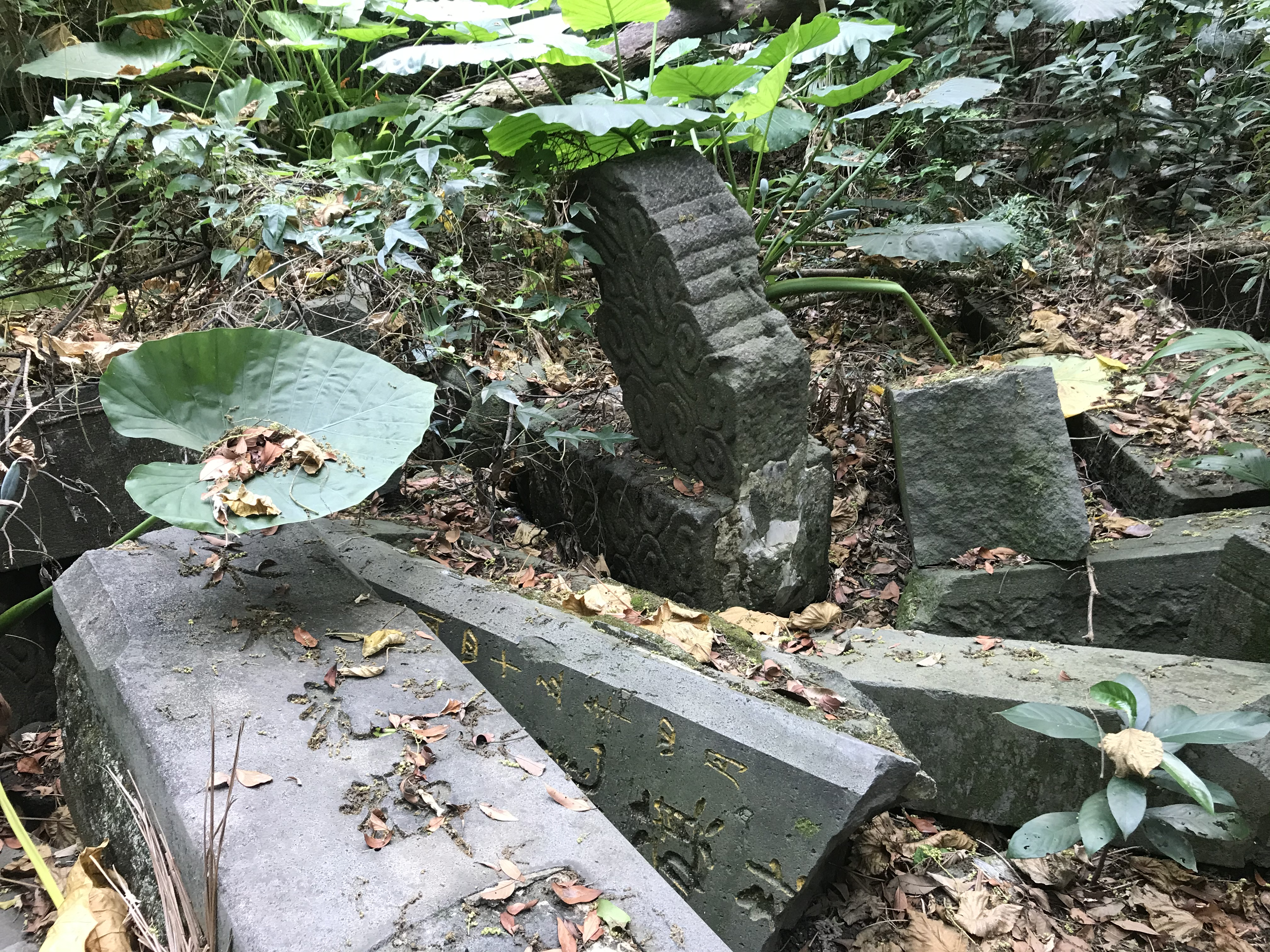 陳濟棠將軍墓園旌表石